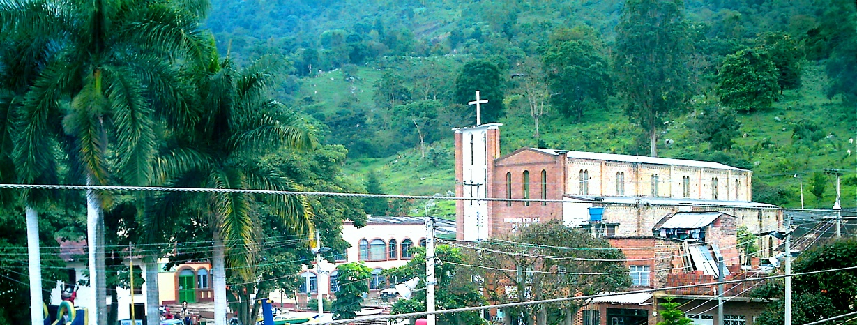 Panorámica del centro de Venecia (Cundinamarca, Colombia) y su iglesia